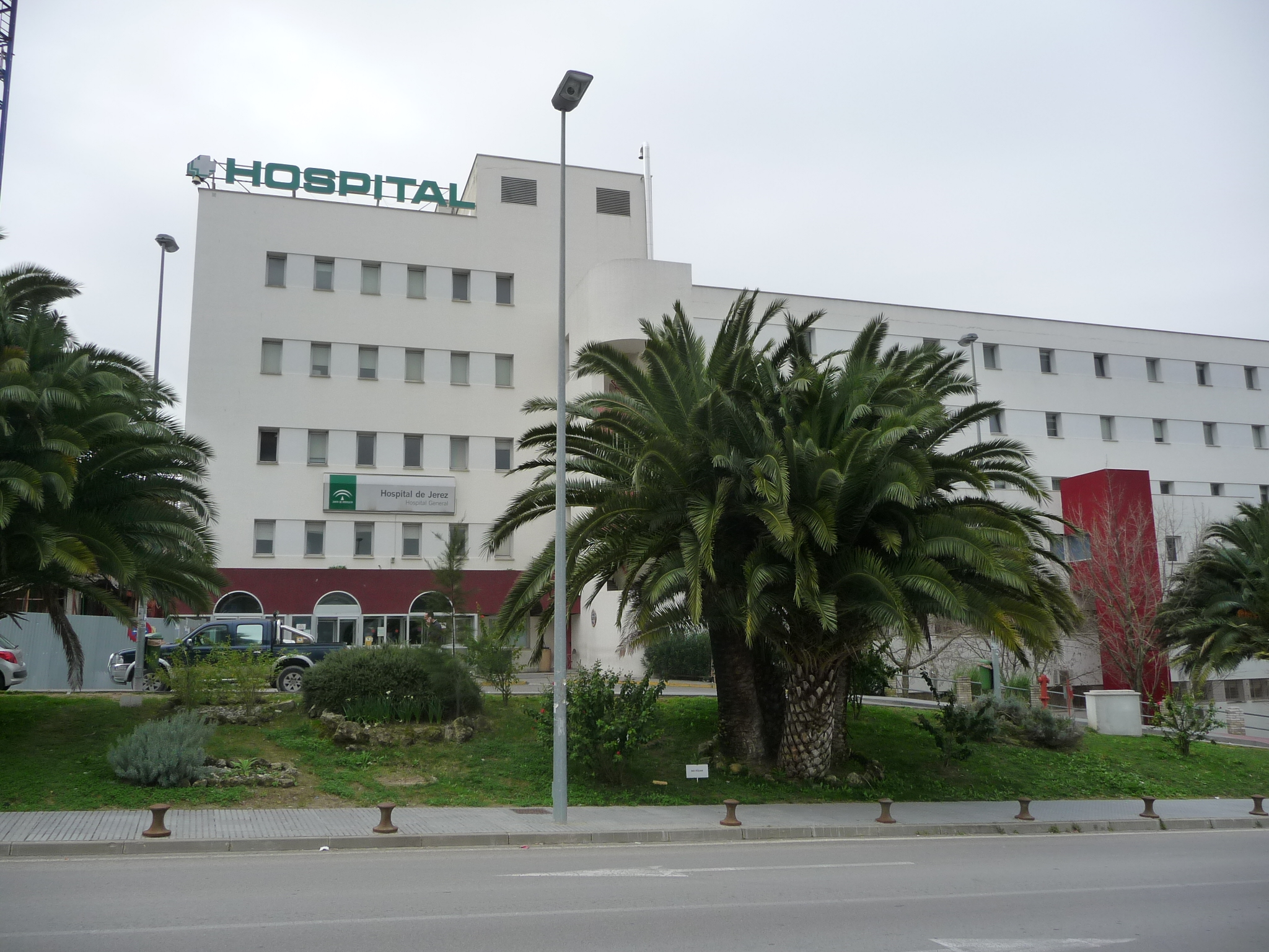 Hospital de Jerez de la Frontera (Andalucía, España)